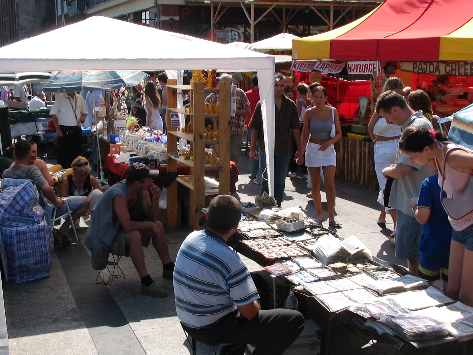 Jarmark Dominikański, Gdańsk